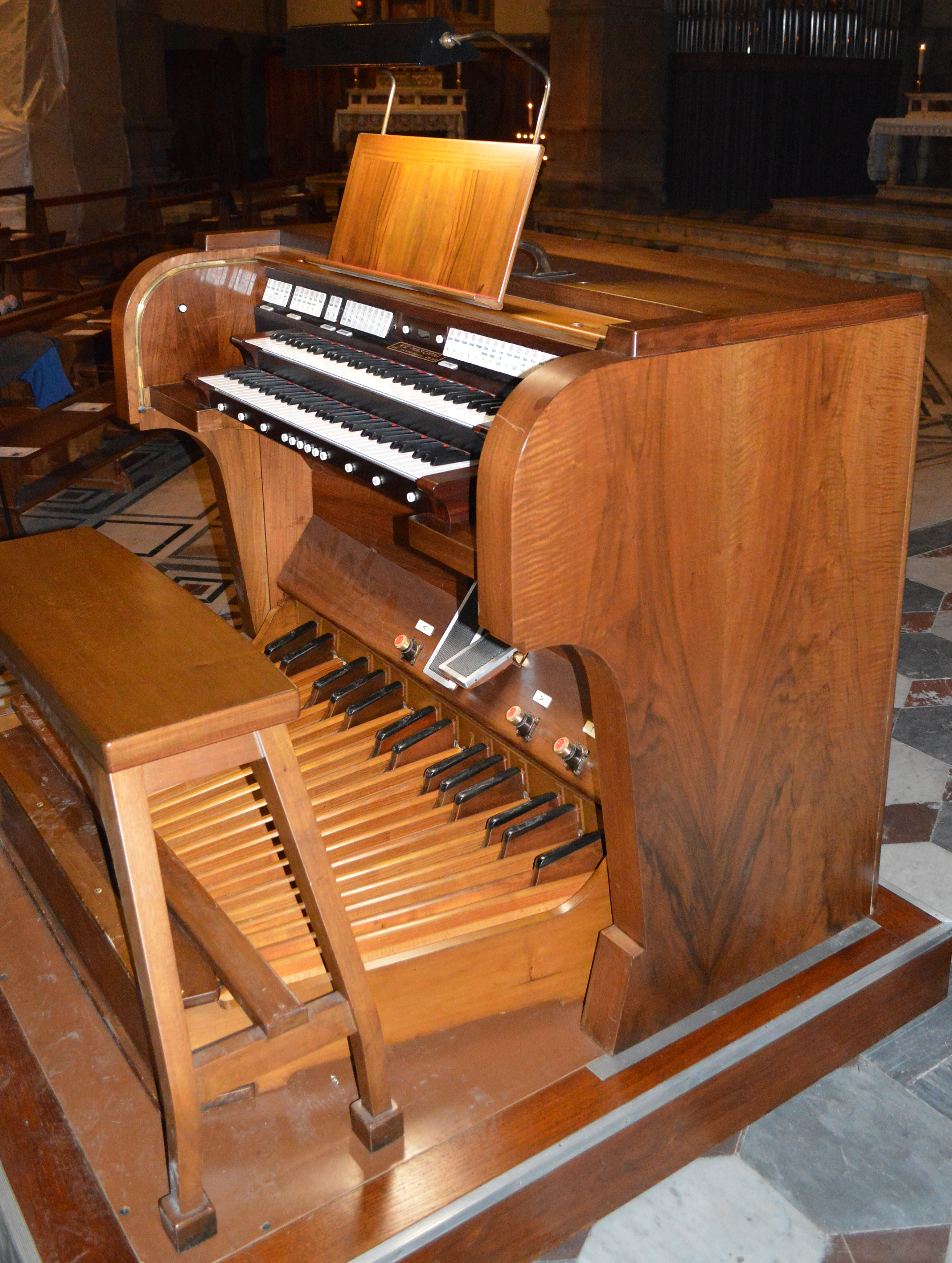 La consolle a due manuali, situata nella cappella dei Santi Simone e Giuda.